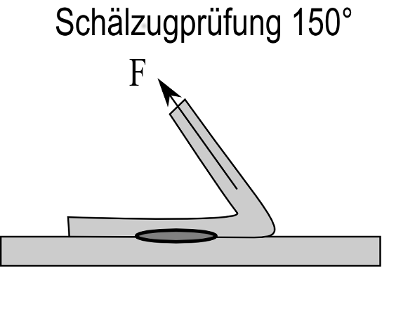 Prüfung von Kleinteilschweißverbindungen: Schälzugprüfung - Winkel 150°